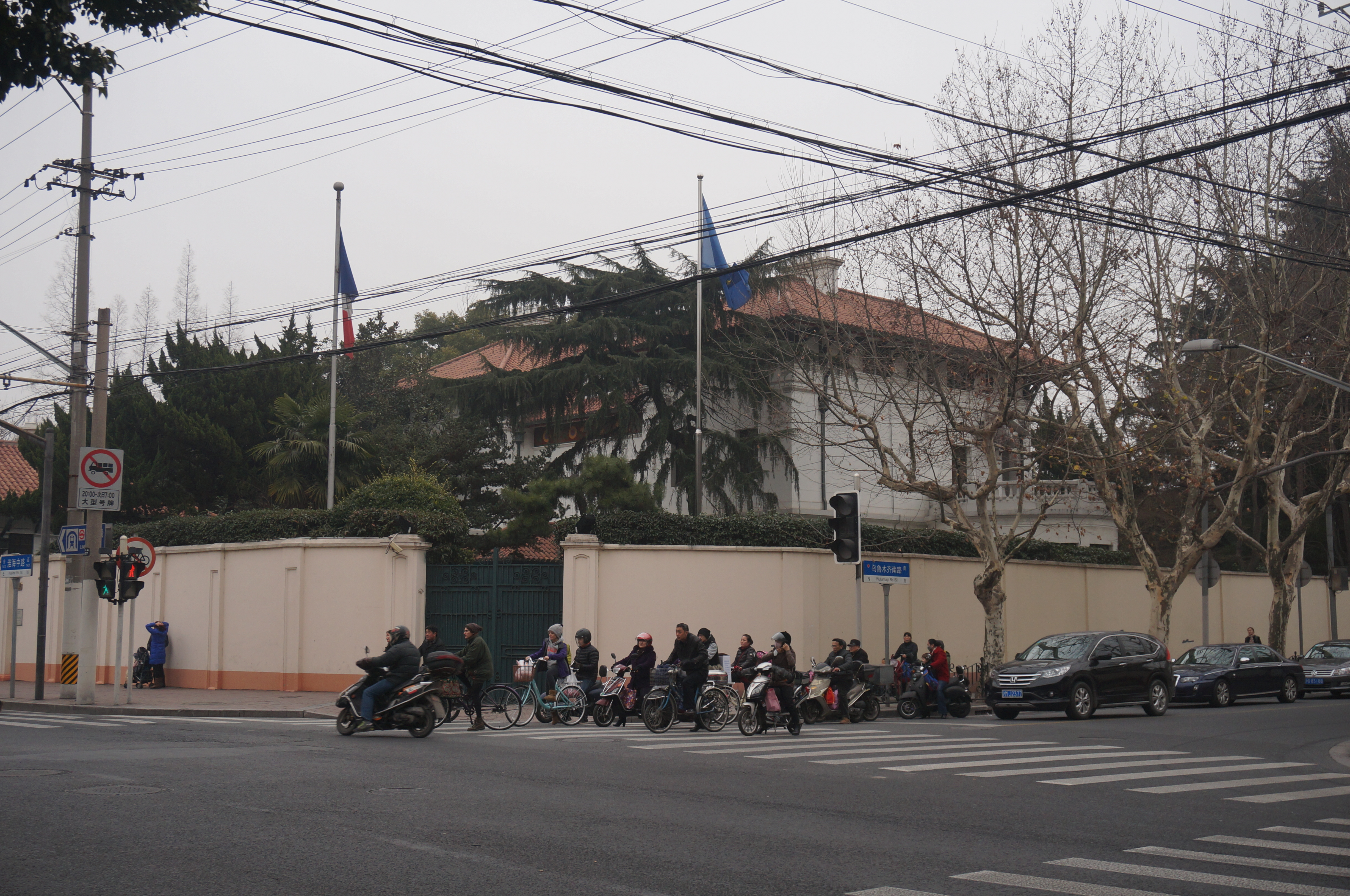 中文（中国大陆）: 法国驻上海总领事馆